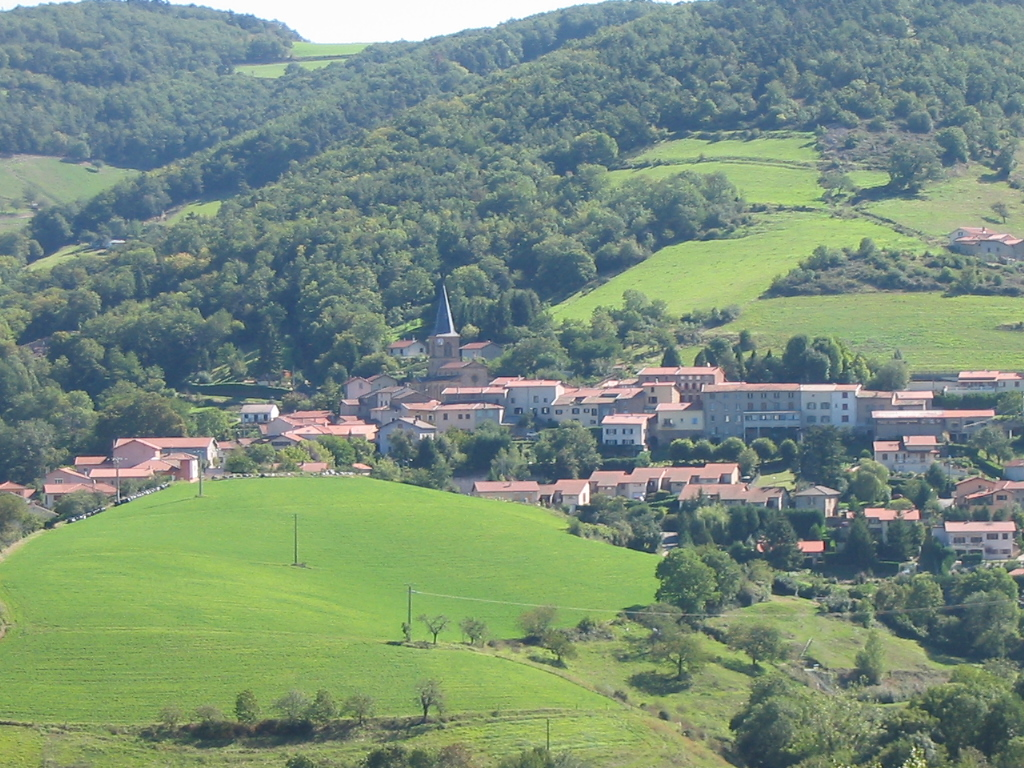 Village de Montromant